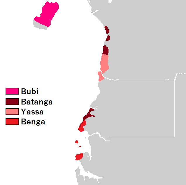 Lenguas bubi-benga